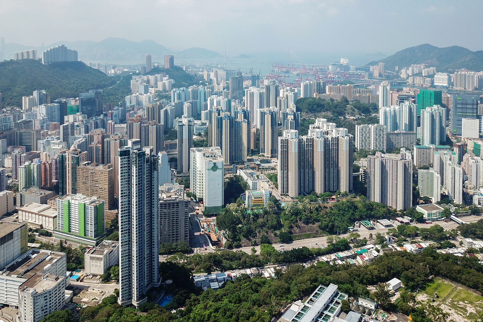 Chung Kwai Chung & Tai Wo Hau